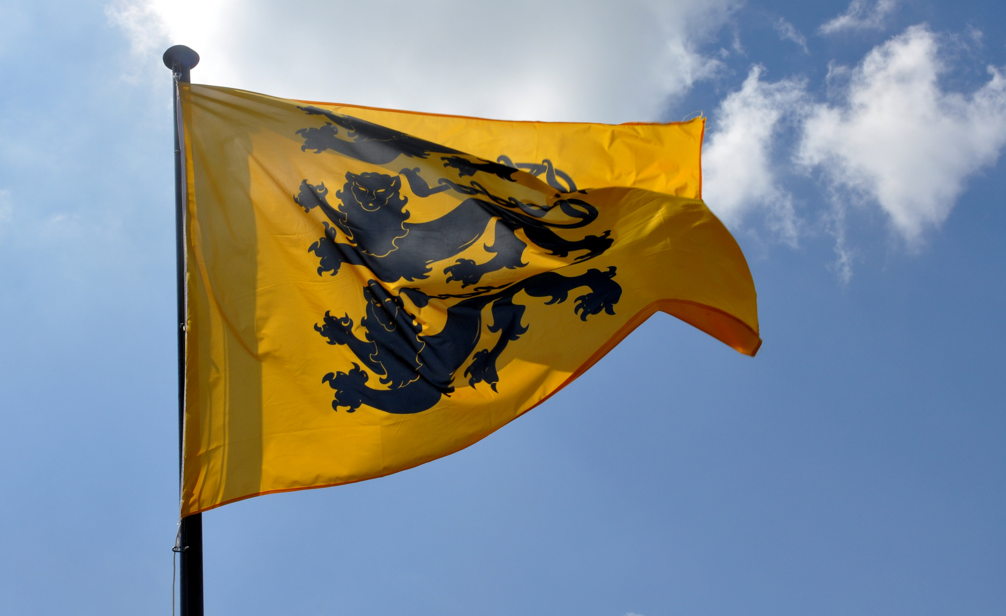 Waldburg (Württemberg), Fahne der Waldburger auf der Waldburg